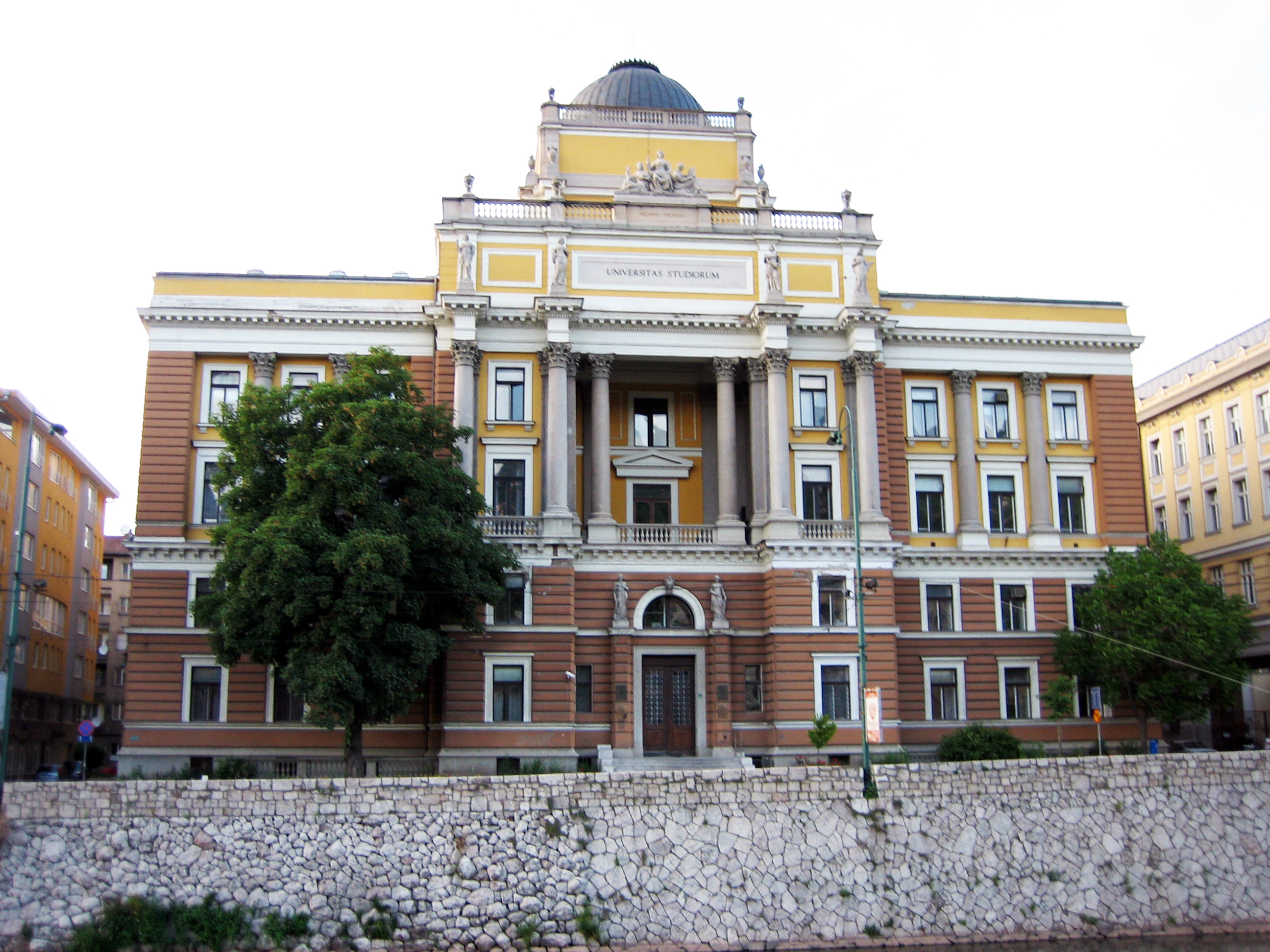 Sarajevo, Universitätsgebäude